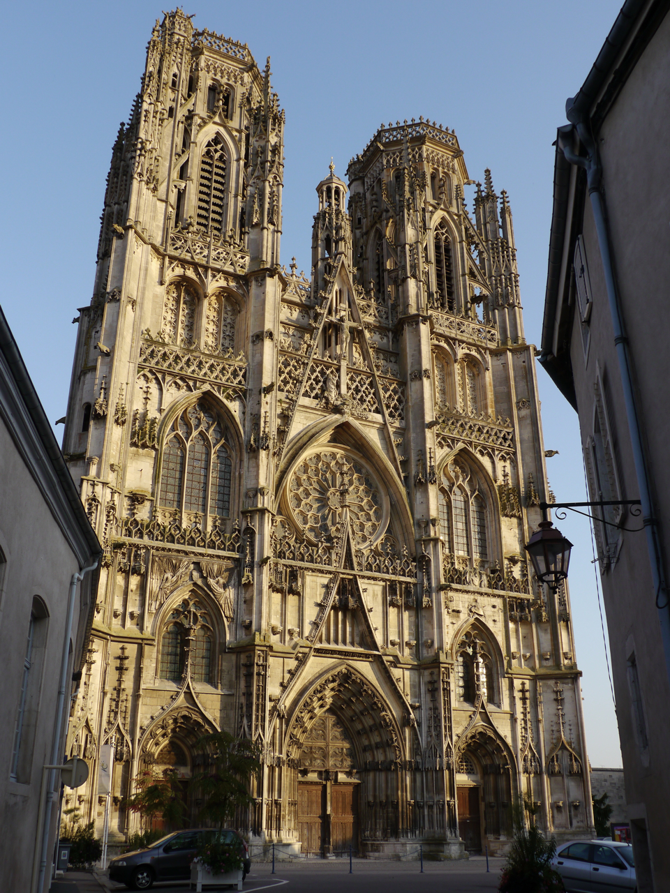 Description : façade gothique flamboyant de la Cathédrale Saint-Étienne de Toul, Lorraine, France.